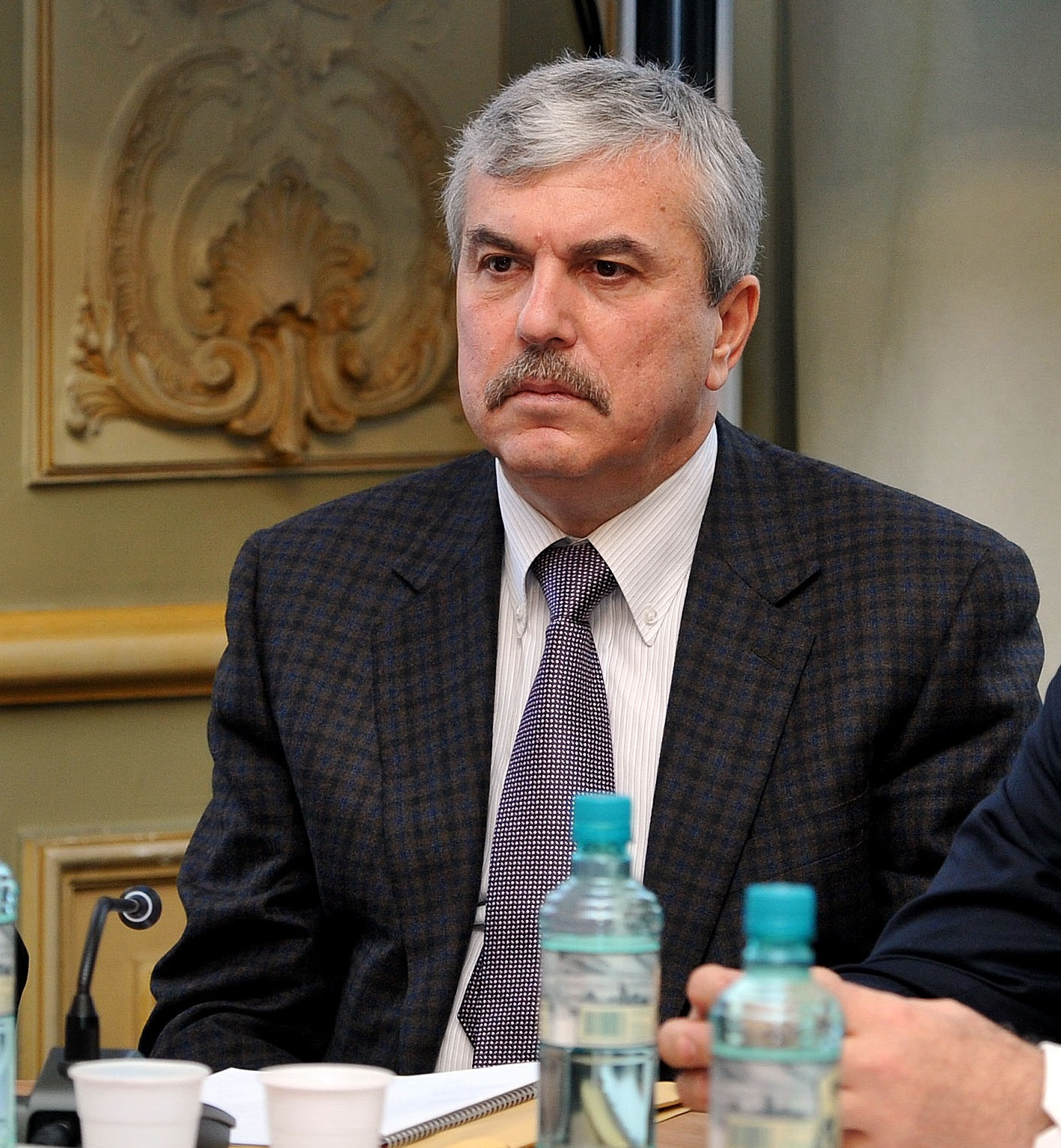 Dan Nica la reuniunea BPN a PSD - 06.01.2014